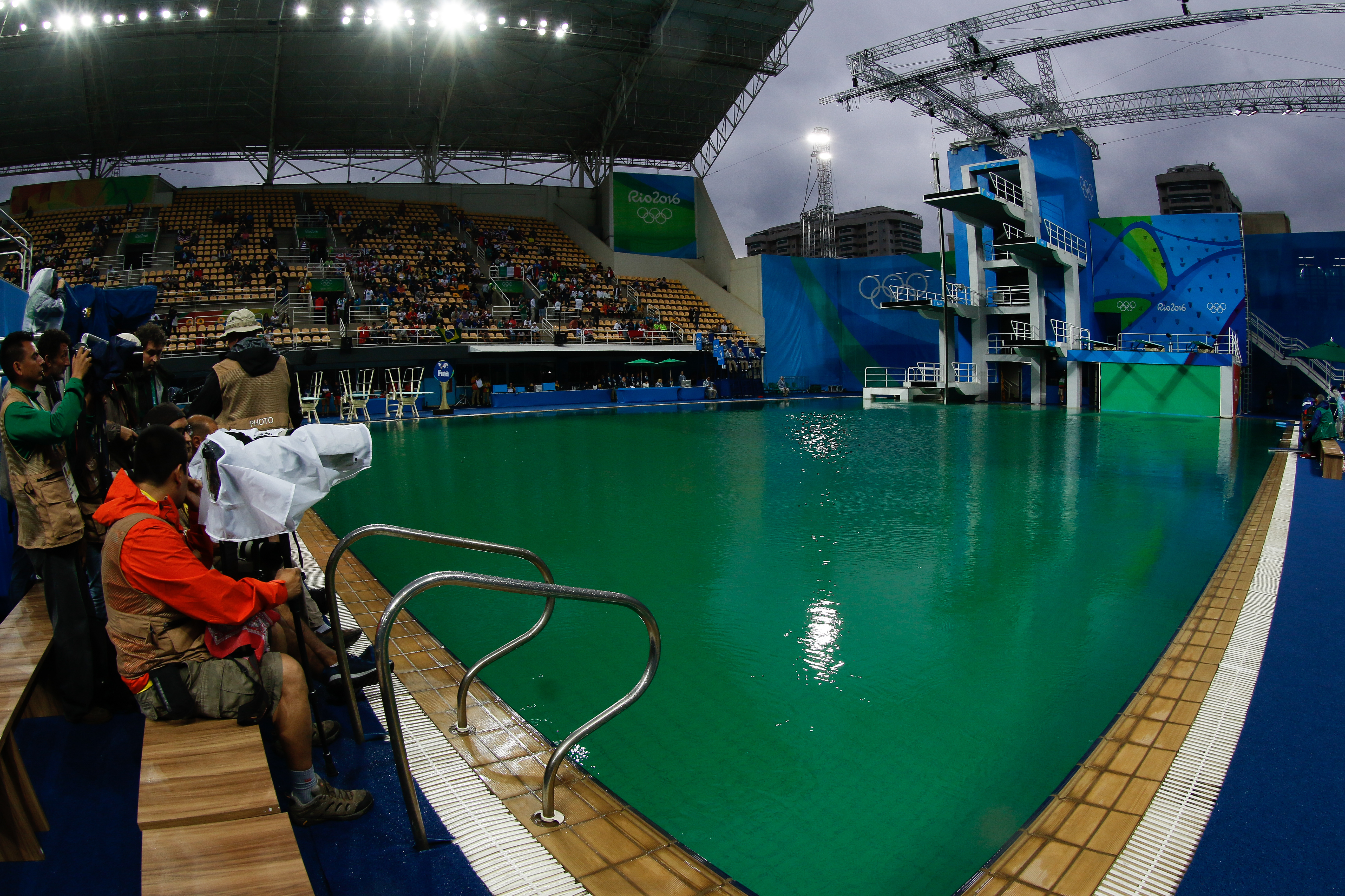 Rio de Janeiro - Piscinas do Parque Aquático Maria Lenk durante competição de saltos ornamentais dos Jogos Rio 2016 (Fernando Frazão/Agência Brasil)